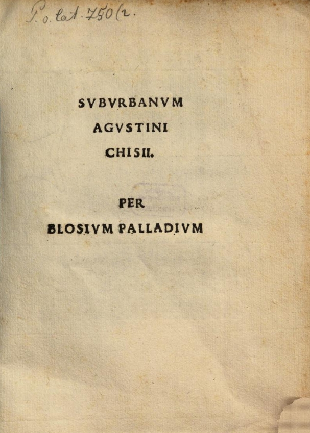 Blosius Palladius, Suburbanum A[u]gustini Chisii, 1512 title page